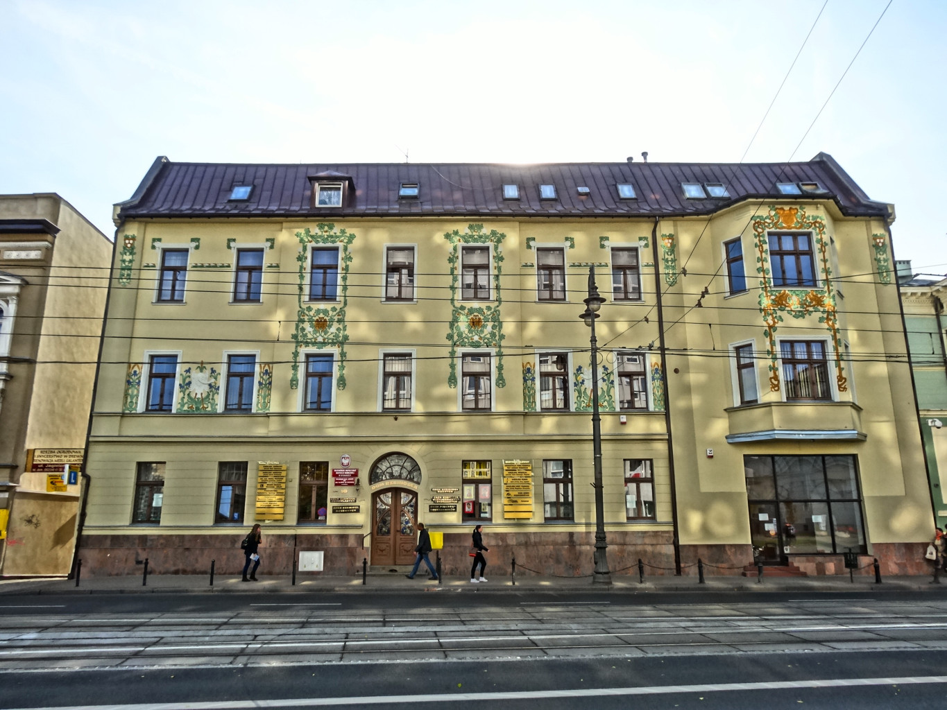 Kamienica ul. Jagiellońska 10 w Bydgoszczy (1862-1866, przebudowywana)